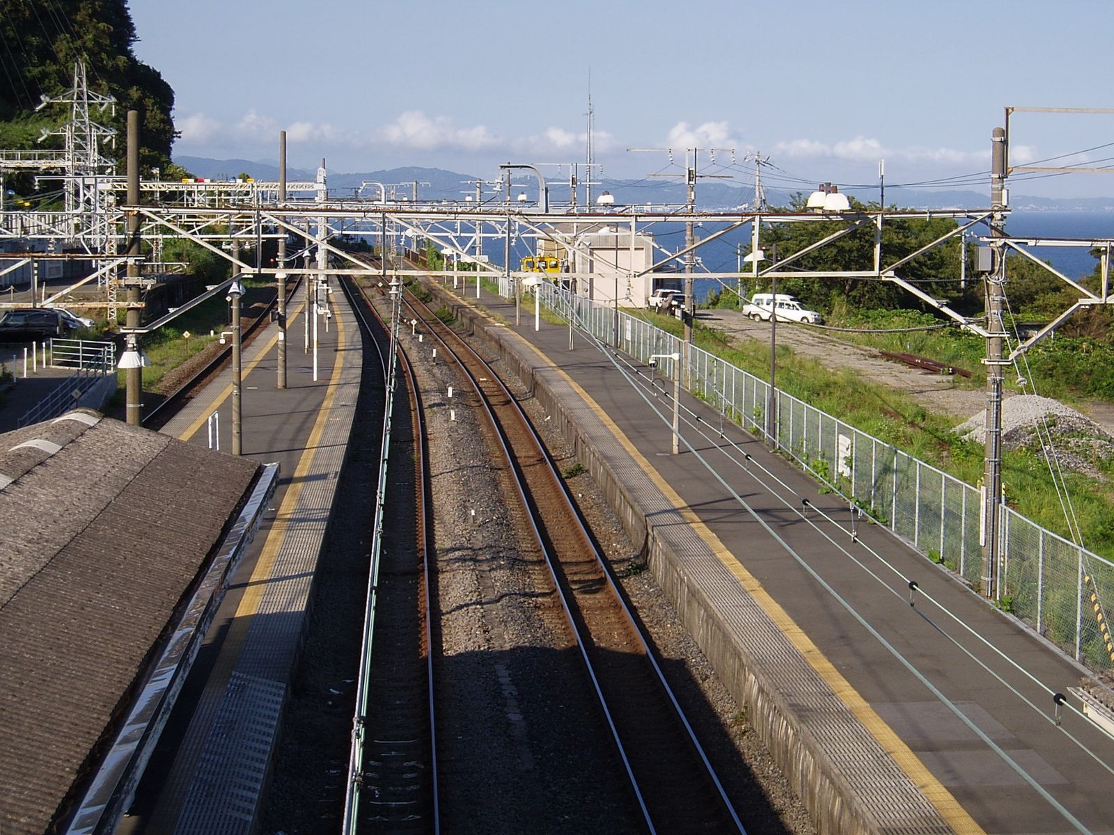 根府川駅の跨線橋から東京方面を望む